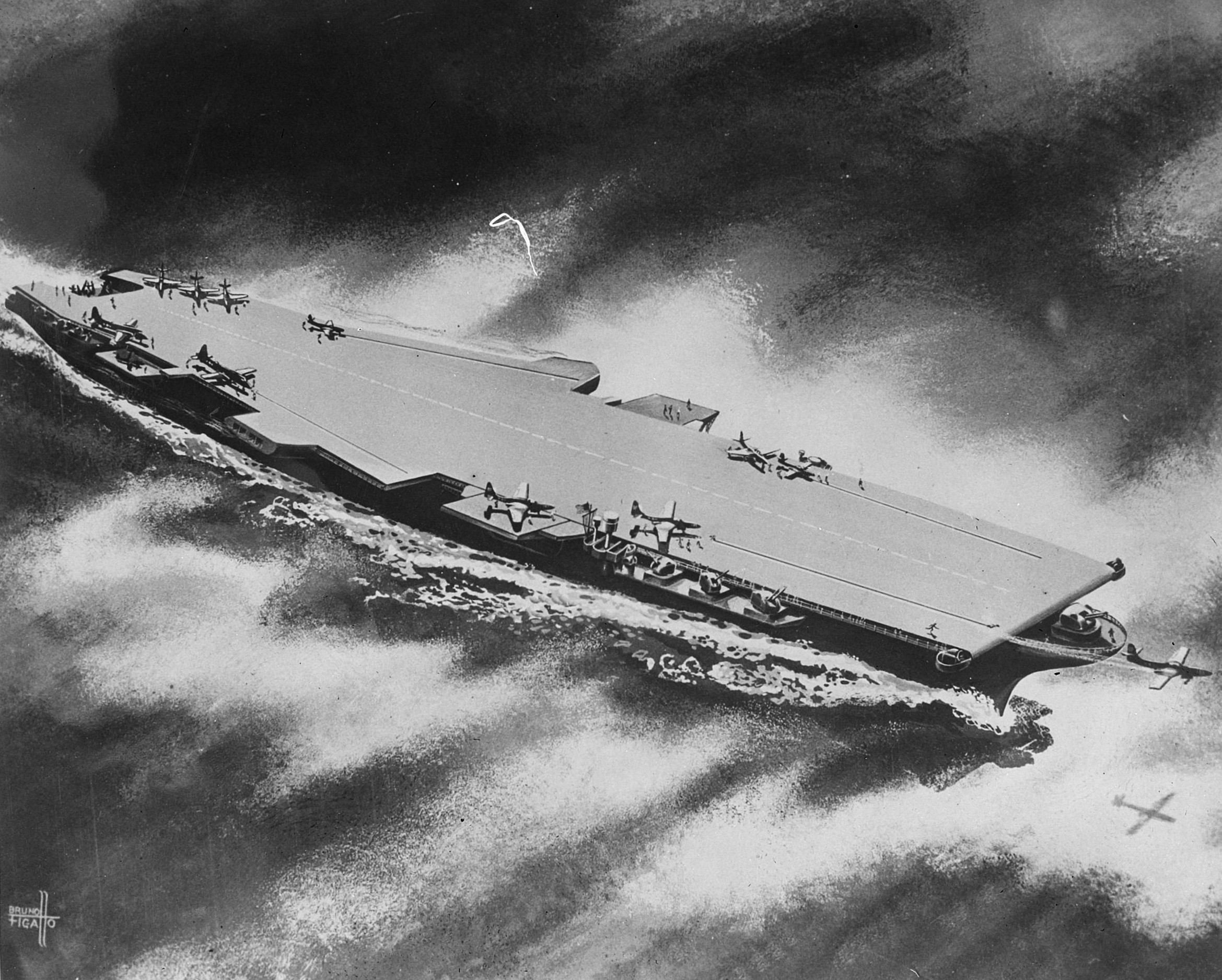 Collectie / Archief : Fotocollectie Anefo Reportage / Serie : [ onbekend ] Beschrijving : Ontwerp van een nieuwe klasse vliegdekschip [zonder commandotoren] Annotatie : Repronegatief Marvo 706108 Datum : 17 maart 1949 Trefwoorden : luchtopnamen, marine, militaire vaartuigen Instellingsnaam : Marvo Fotograaf : Fotograaf Onbekend / Anefo Auteursrechthebbende : Nationaal Archief Materiaalsoort : Glasnegatief Nummer archiefinventaris : bekijk toegang 2.24.01.09 Bestanddeelnummer : 903-2799